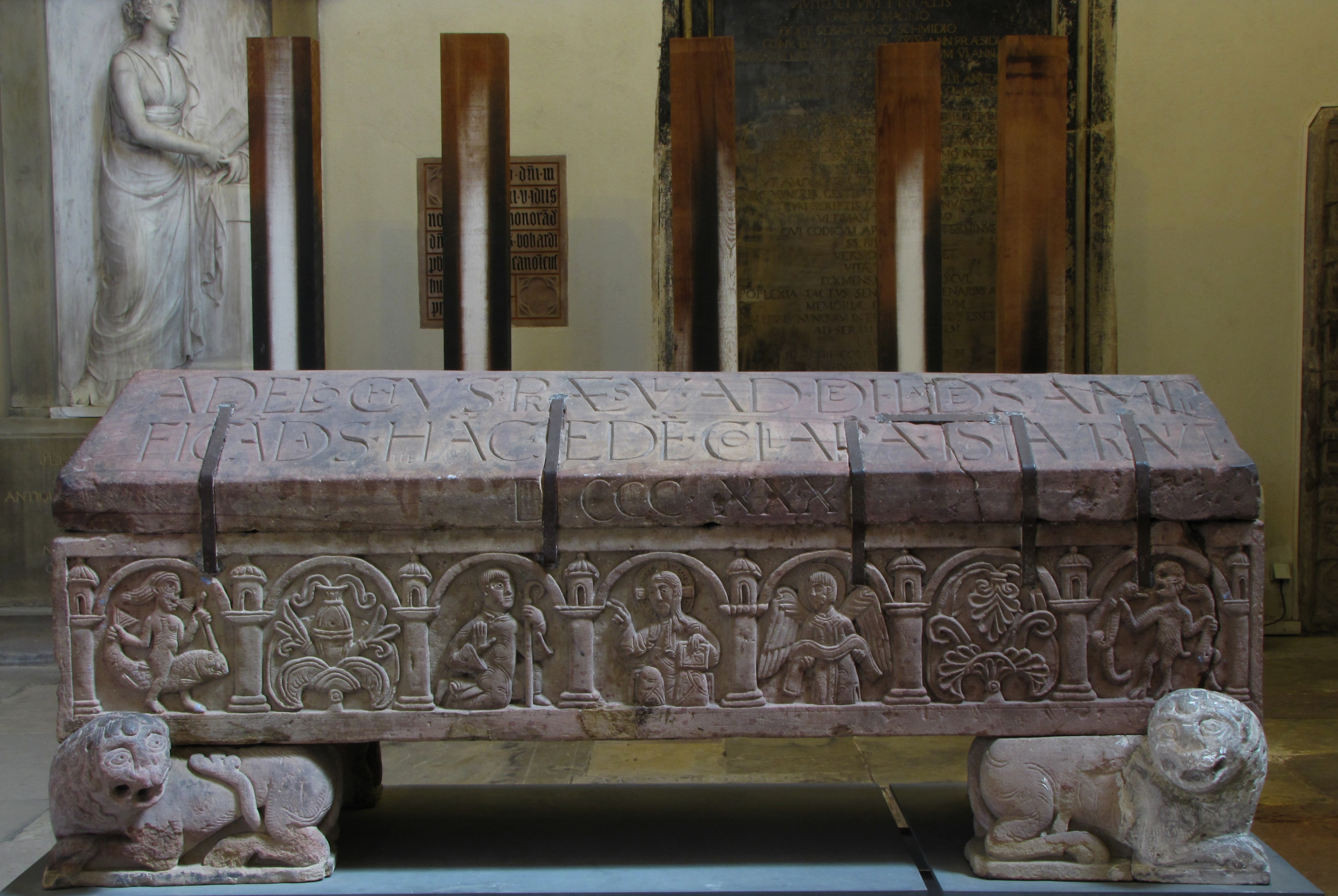 Alsace, Bas-Rhin, Église protestante Saint-Thomas de Strasbourg, 4 rue Martin-Luther (PA00085032). Sarcophage de l'évêque Adeloch (vers 1130): face longue: le Christ bénit Adeloch tonsuré et tenant la crosse, en présence d’un ange ; l’évêque, sans doute âgé, porte ici la barbe. Ce groupe est placé entre des allégories de la Terre (un faune velu brandissant deux serpents) et de la Mer (une néréide assise sur un dauphin). Les pieds sont en forme de lions.